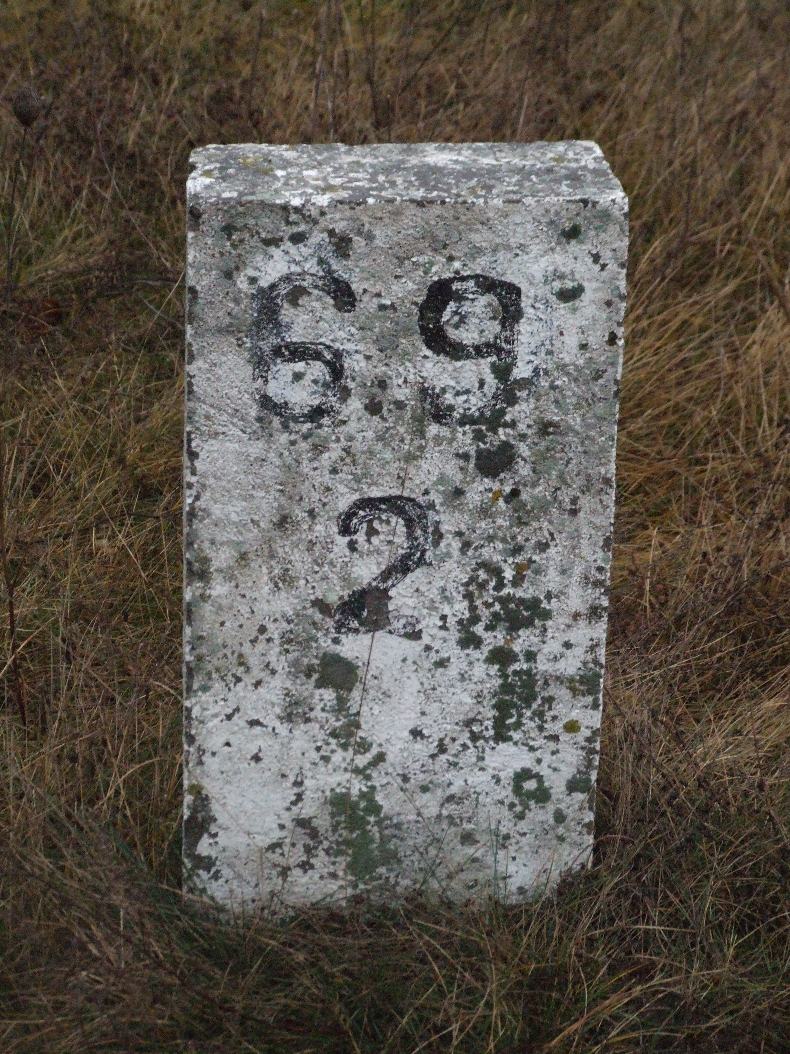 Karsin (stacja kolejowa)